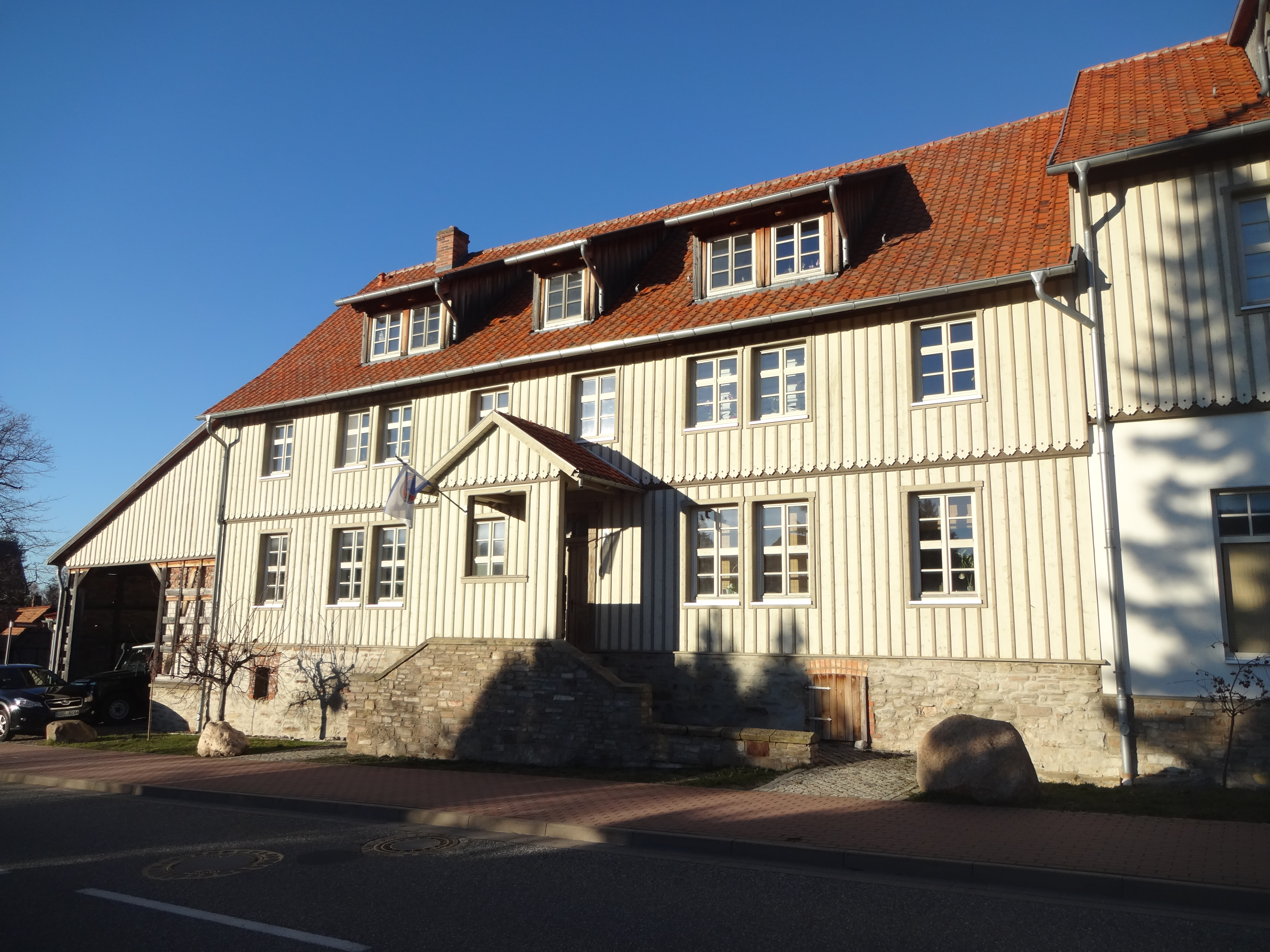 denkmalgeschützter ehemaliger Gasthof in der Friedensstraße 8 in Darlingerode